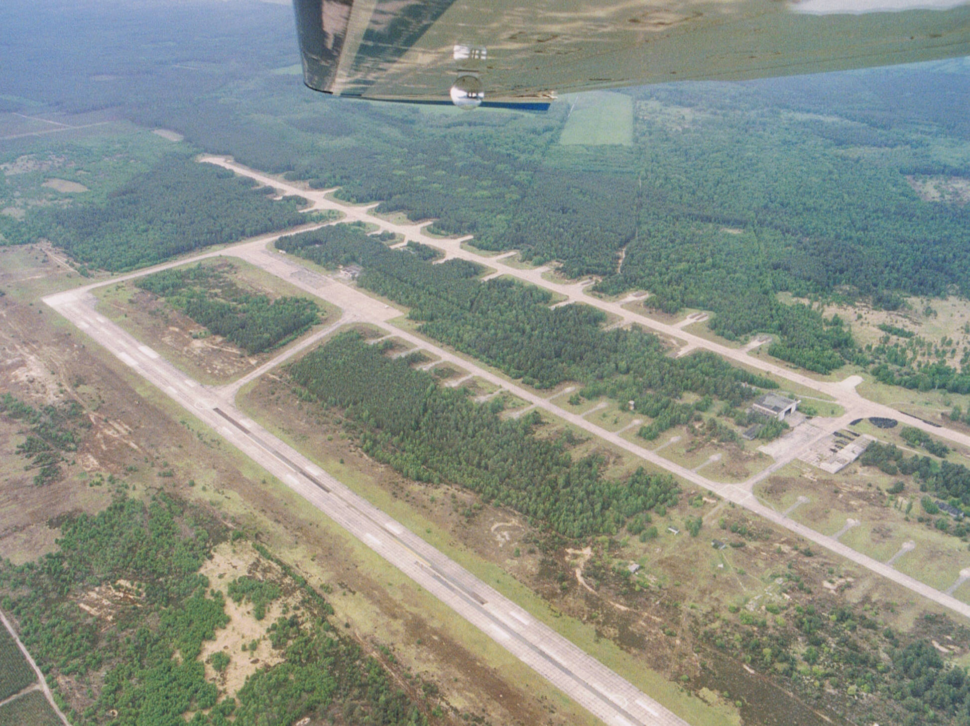 Luftaufnahme des ehemaligen Militärflugplatzes Sperenberg